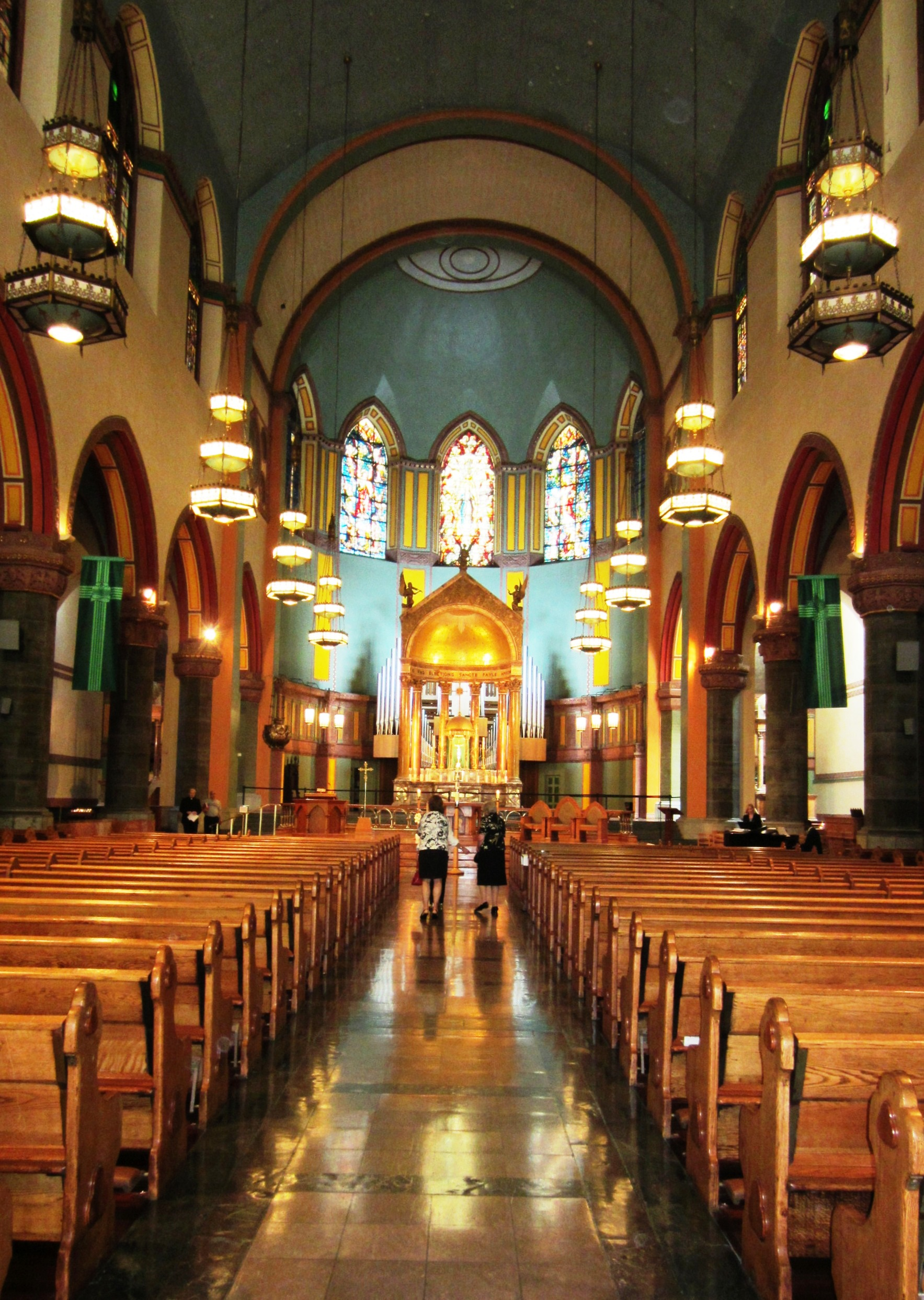 Innenansicht der St. Pauls Kirche in der Columbus Avenue